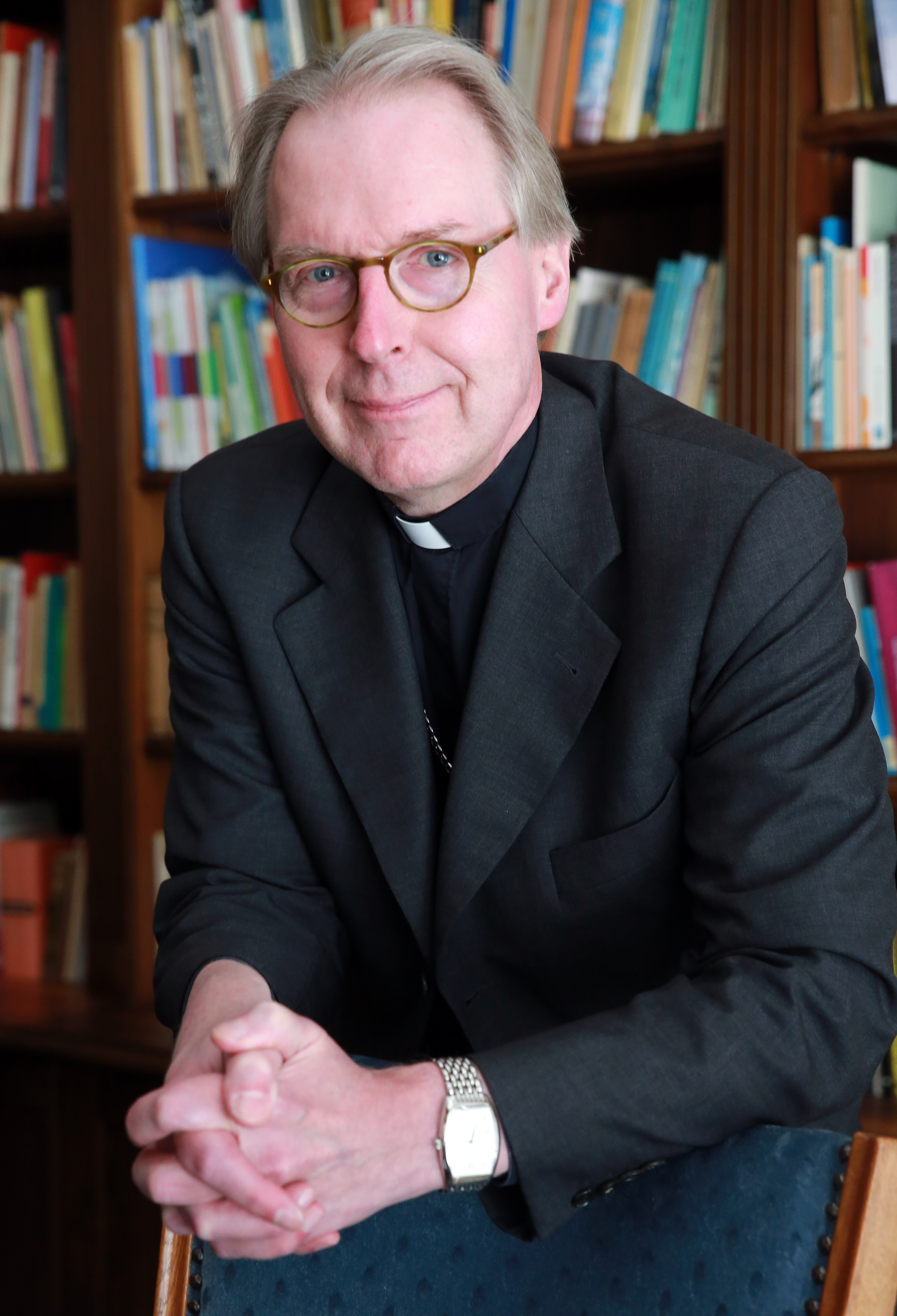 Bisschop Gerard de Korte (2015)